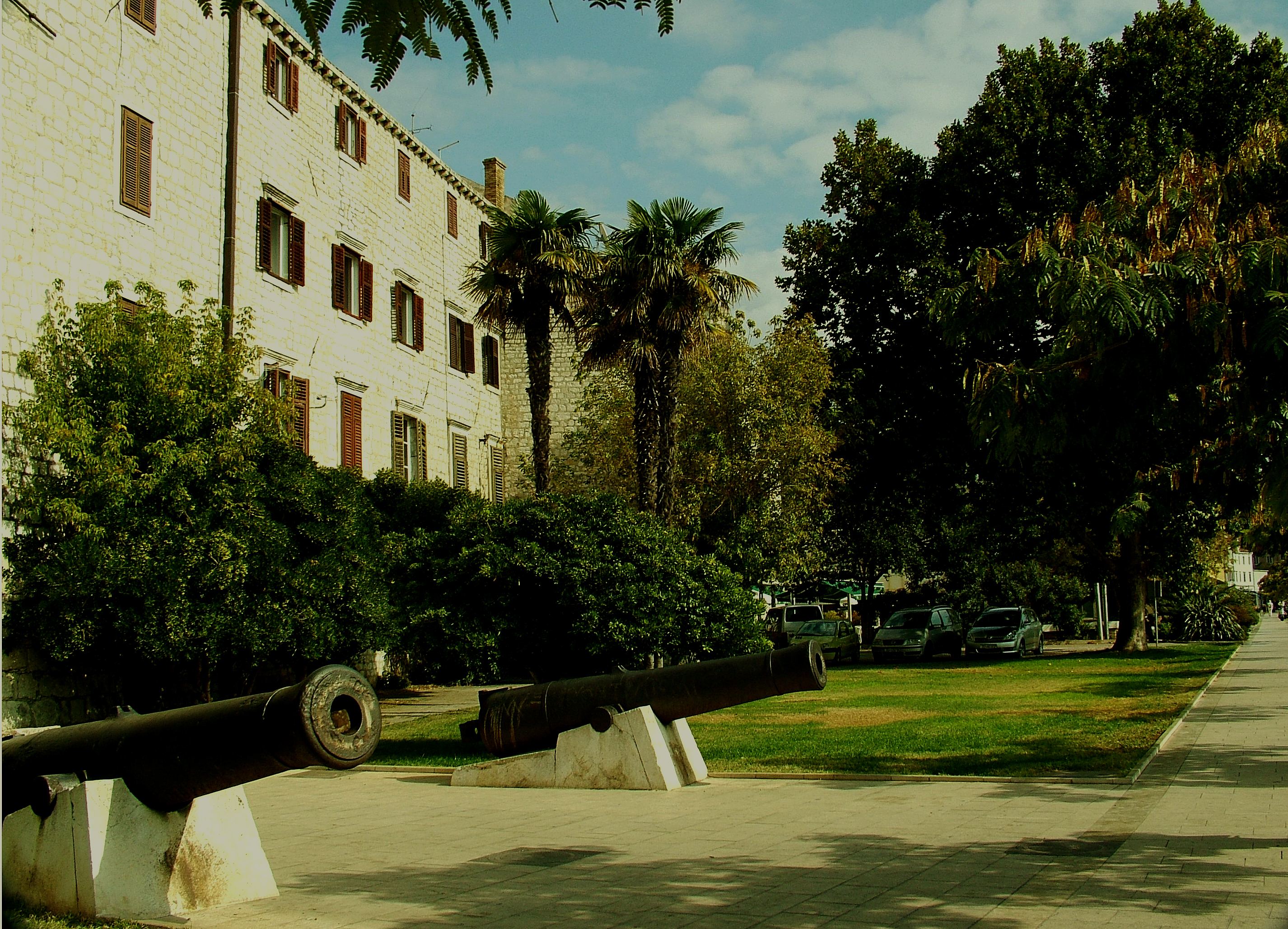 Sibenik: Tengerparti sétány (Horvátország)